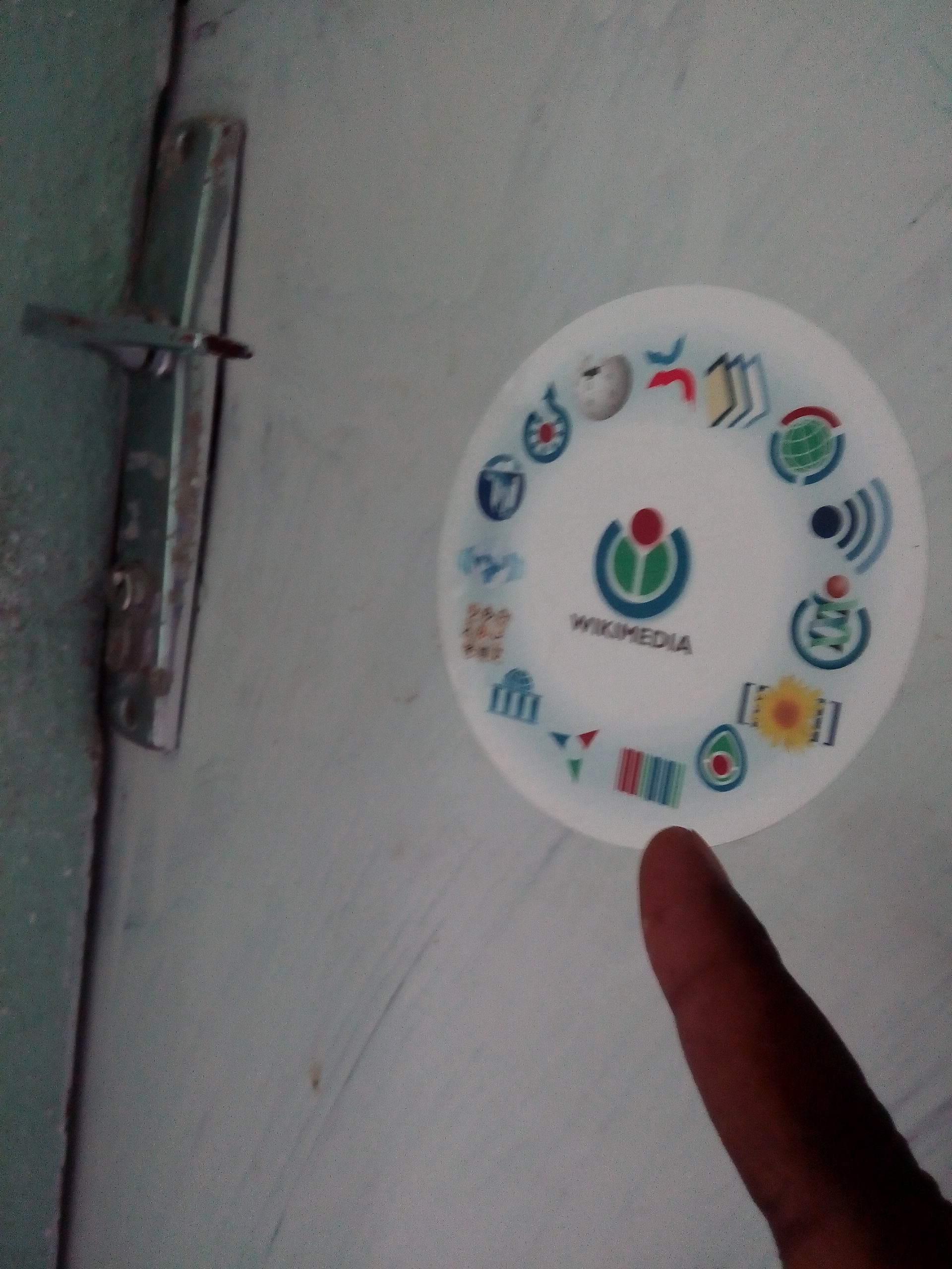 wikimedia Université de Maroua - Cameroun